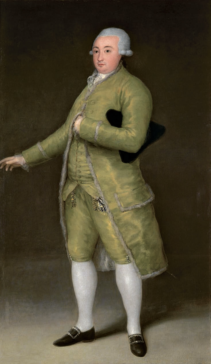 Retrato del político y financiero español Francisco Cabarrús (1752-1810). Consta en el archivo del Banco de San Carlos el pago realizado el día 21 de abril de 1788: R.on [reales de vellón] 4.500 pagados a Fran.co Goya por la pintura y dorado del marco del retrato de cuerpo entero del S.or Fran.co Cabarrus.